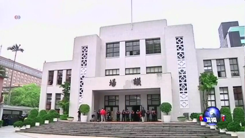 中文（台灣）: 立法院議場。